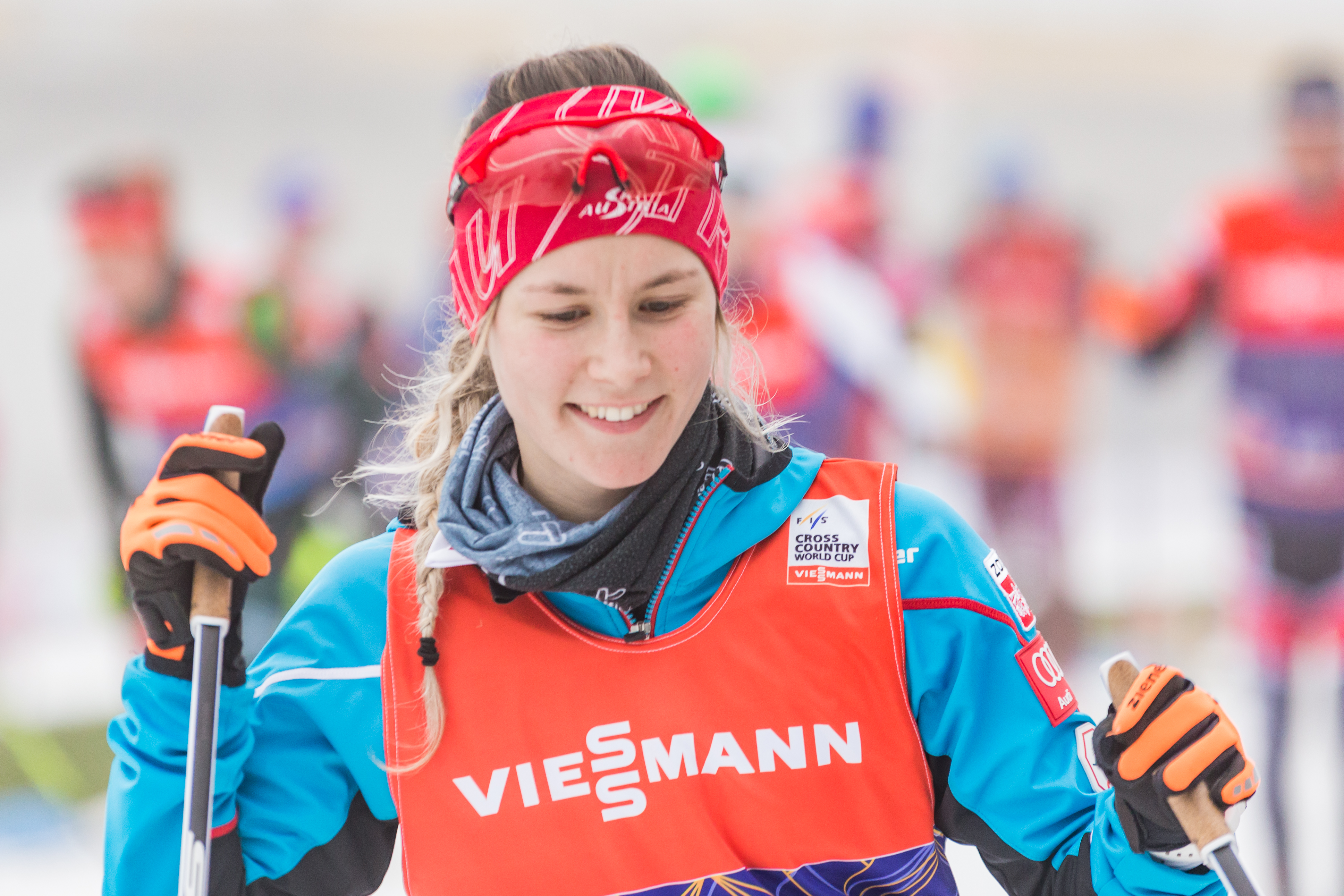 Lisa Unterweger (AUT, Österreich)